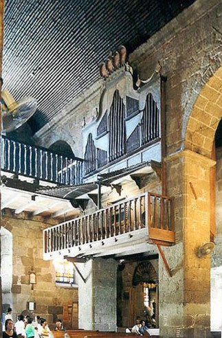 Las Piñas Bamboo Organ, Philippines.